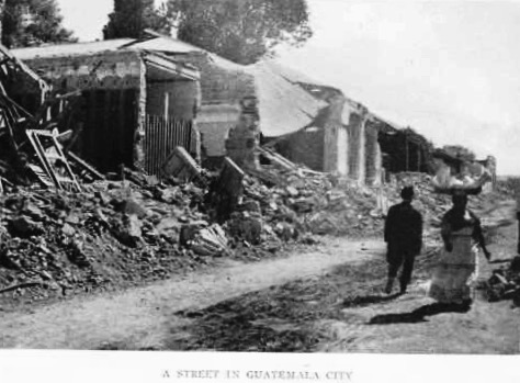 Calle destruida de la Ciudad de Guatemala en 1918.